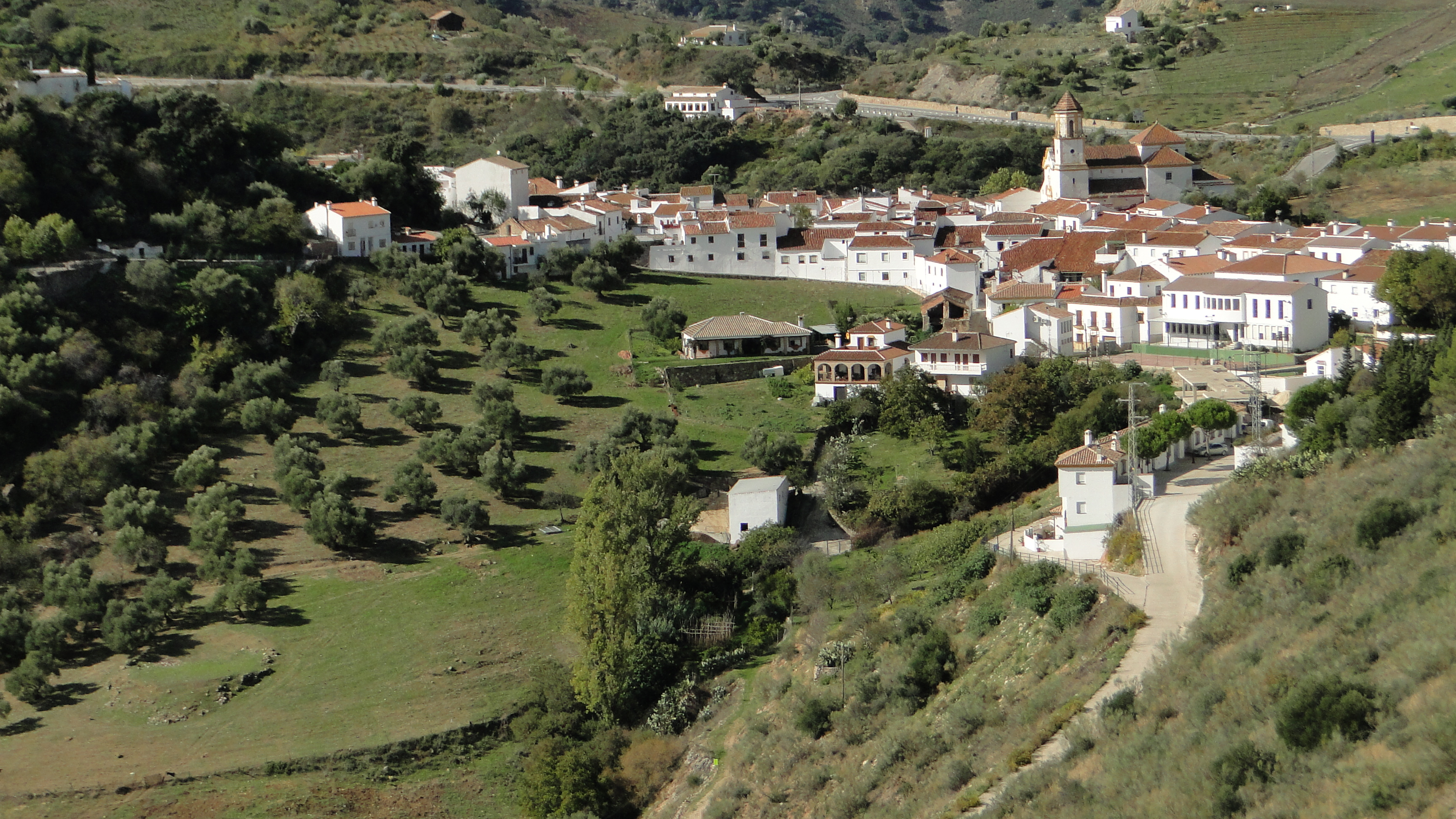 Atajate - Valle del Genal - Málaga